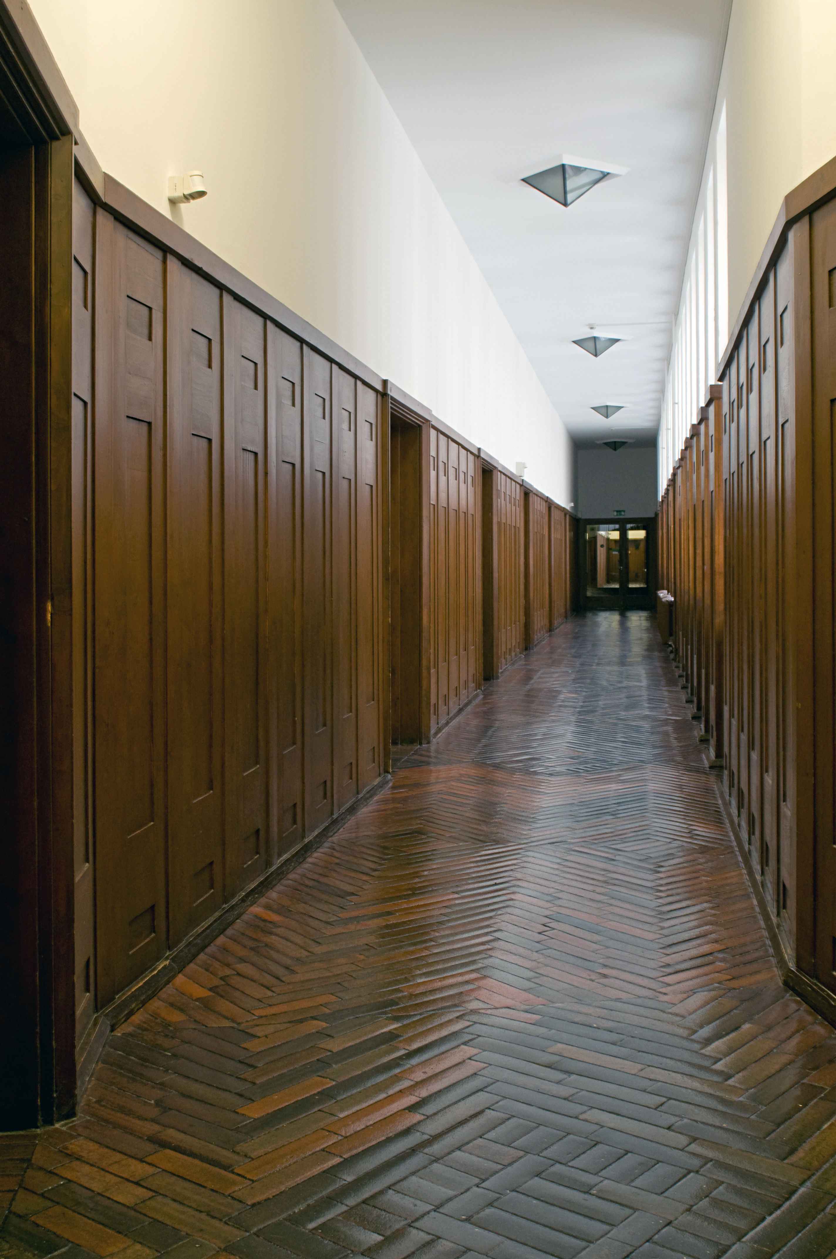 Industriepark HöchstBehrensbau: Holzvertäfelter Innengang mit Bürotüren